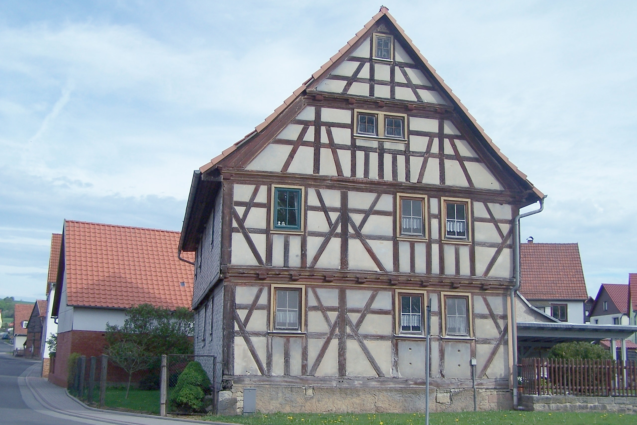 Fachwerkhaus in der Ortslage von Kaltenlengsfeld.